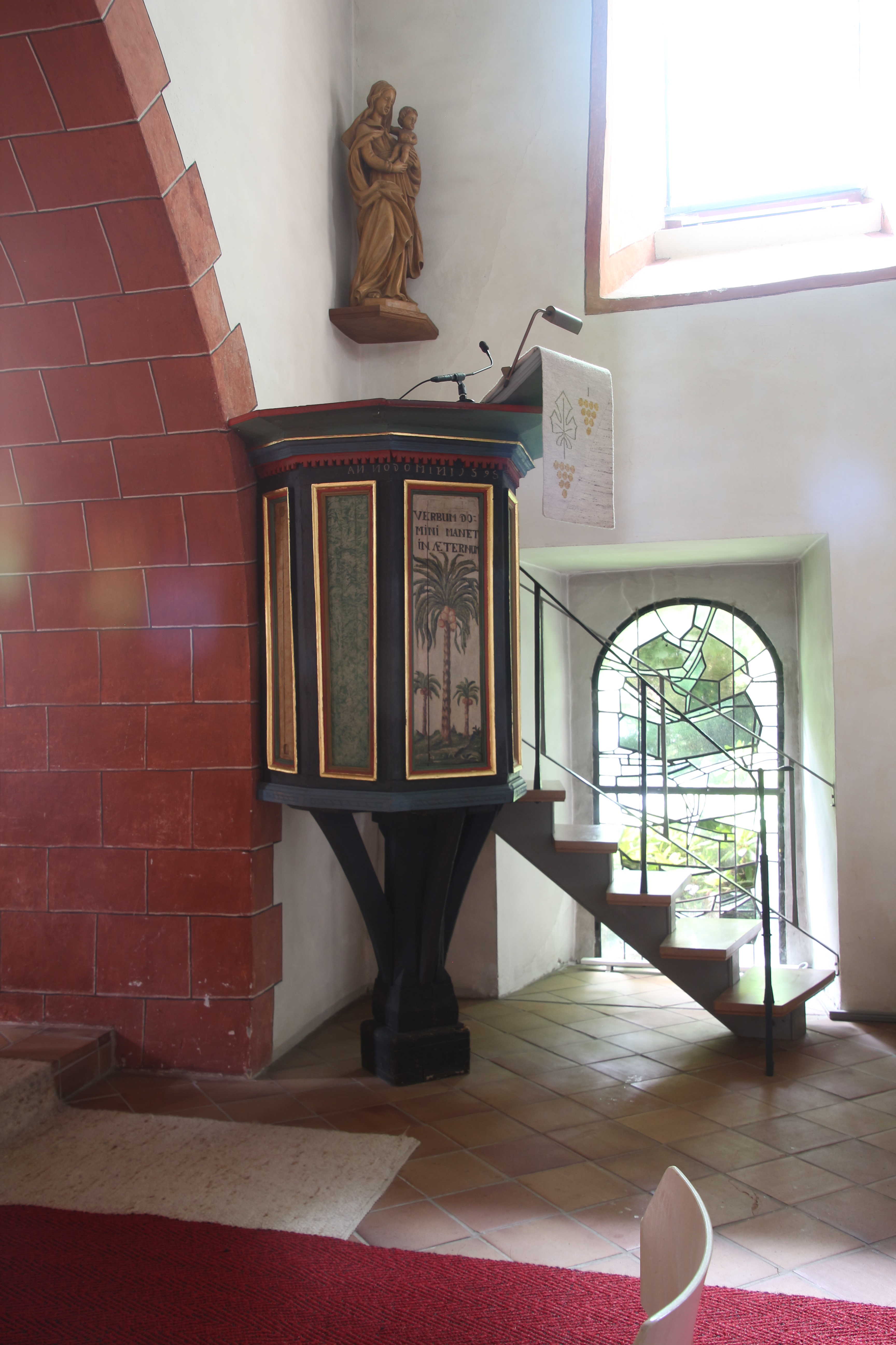 Evangelische Kirche Lixfeld, Landkreis Marburg-Biedenkopf, Hessen